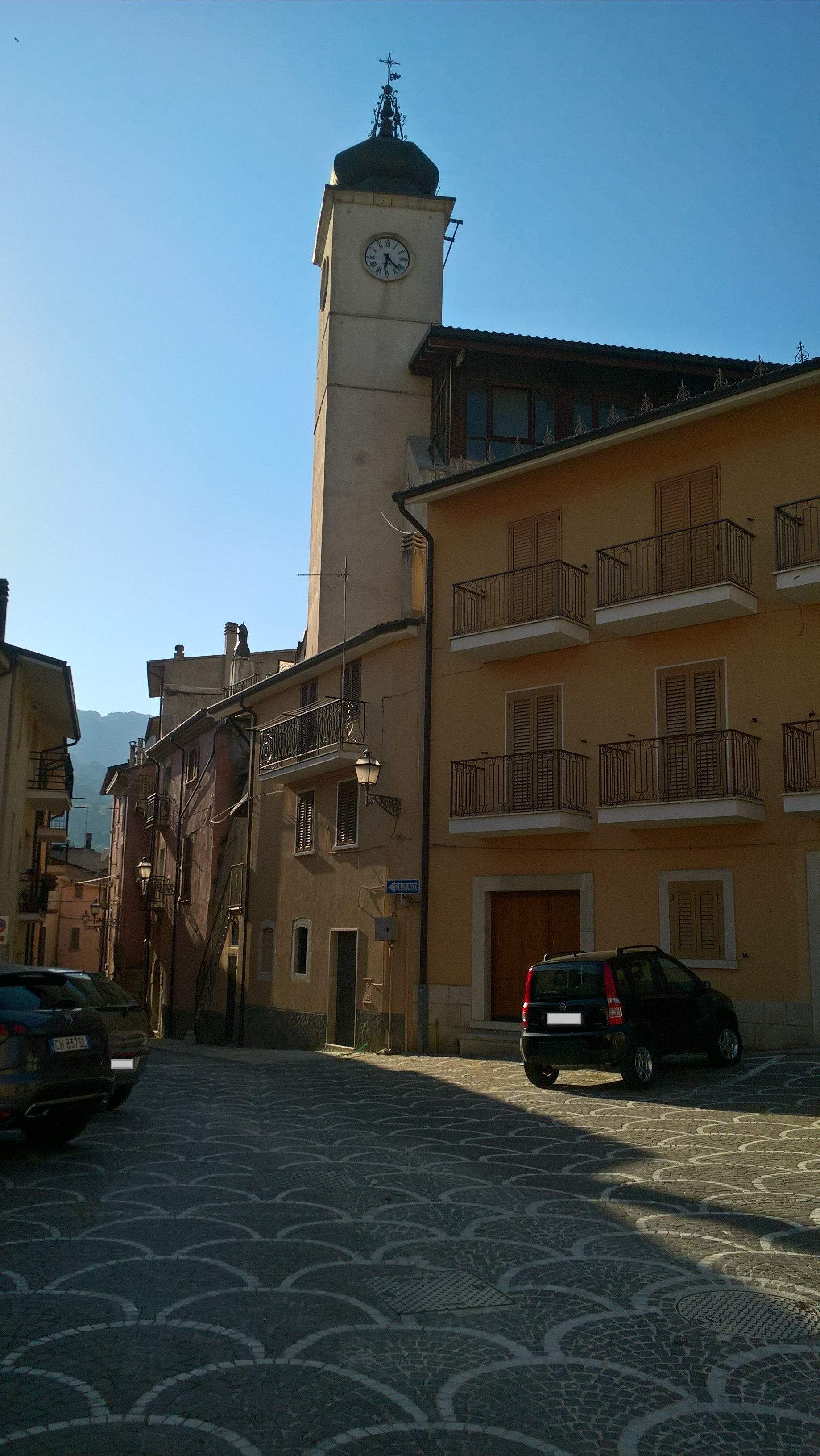 Torre Orologio in Via Borgo Veroli